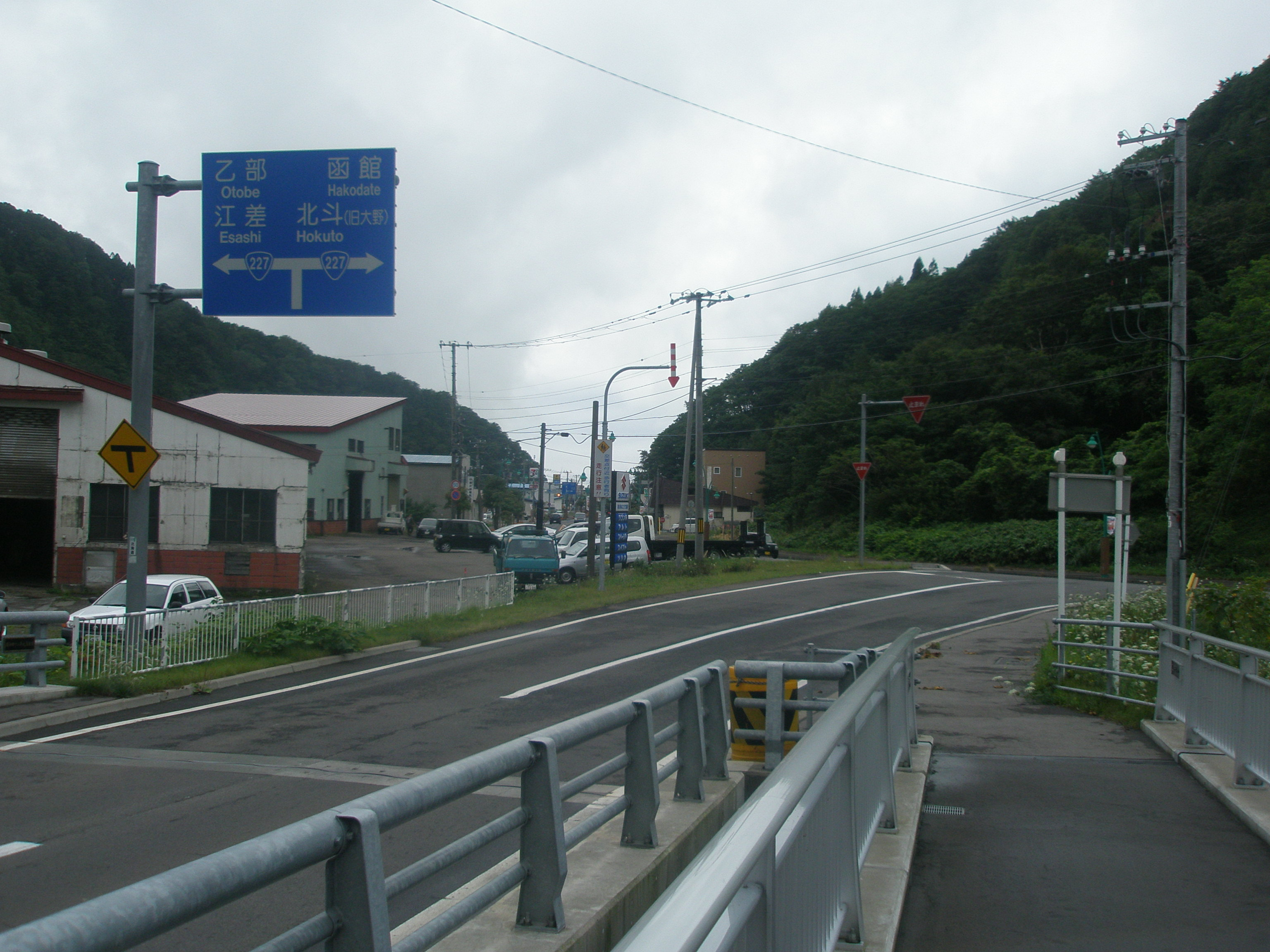 北海道道634号城丘江差線・国道227号交点-1（起点側から、2018年8月撮影）